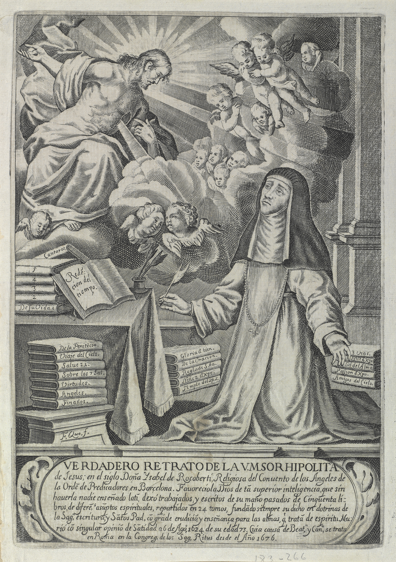 VERDADERO RETRATO DE LA V.M. SOR HIPOLITA / de Jesus; en el siglo Doña Ysabel de Rocaberti, Religiosa del Convento de los Angeles de / la Orden de Predicadores en Barcelona..., Grabado a buril de Francisco Quesádez, ilustración de su obra De los sagrados huesos de Christo. Valencia, 1679